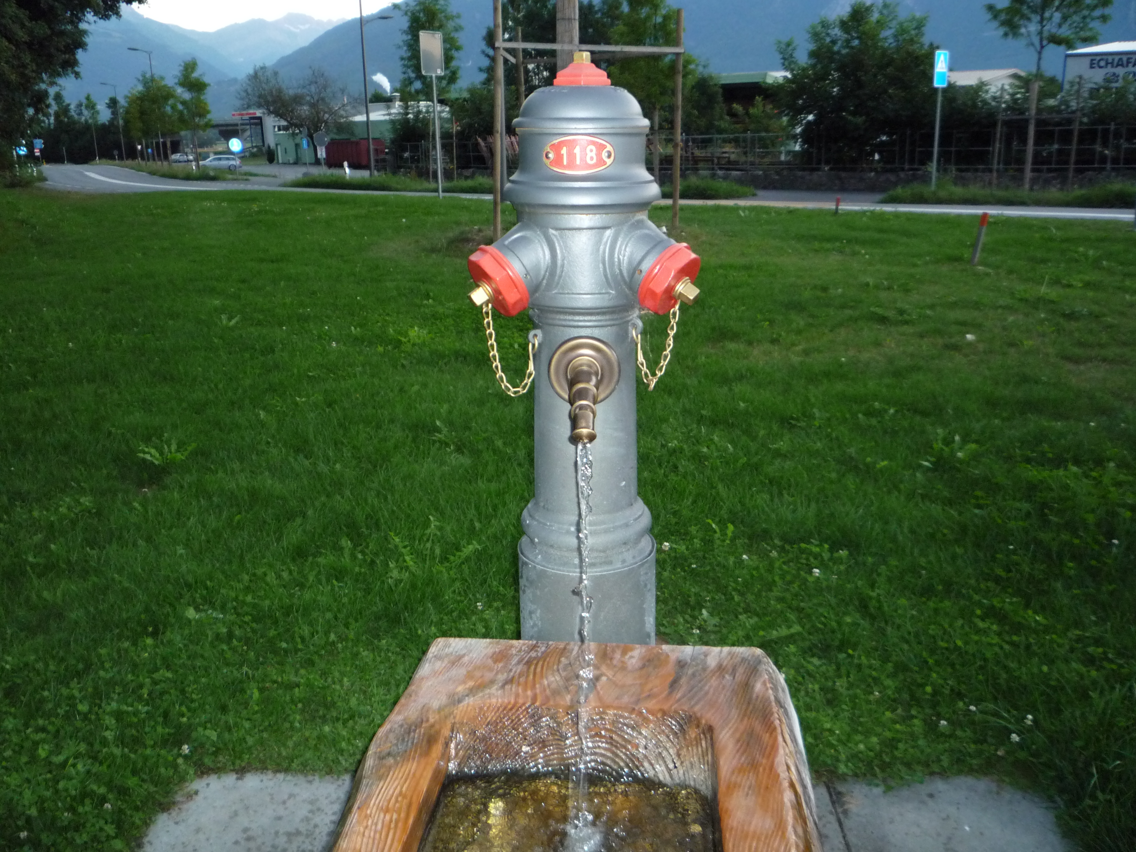 Cet Hydrant (borne incendie), utilisée comme fontaine, se trouve à Aigle, en Suisse, au croisement de la route d'Ollon et du ch. de Marjolin Le numéro 118 inscrit sur la plaquette rouge sur l'Hydrant, signifie le numéro de téléphone des pompiers en Suisse.